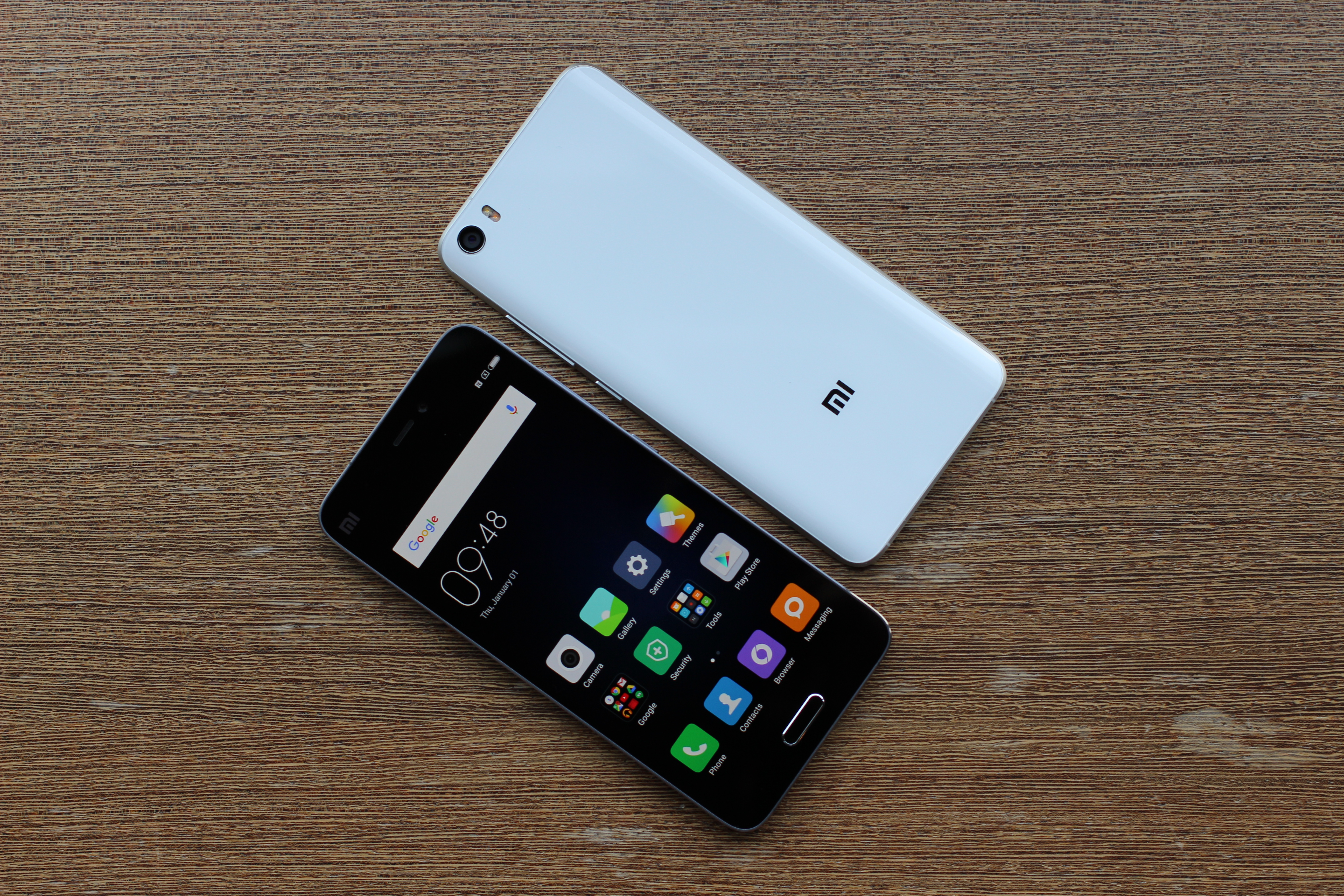 Xiaomi Mi 5